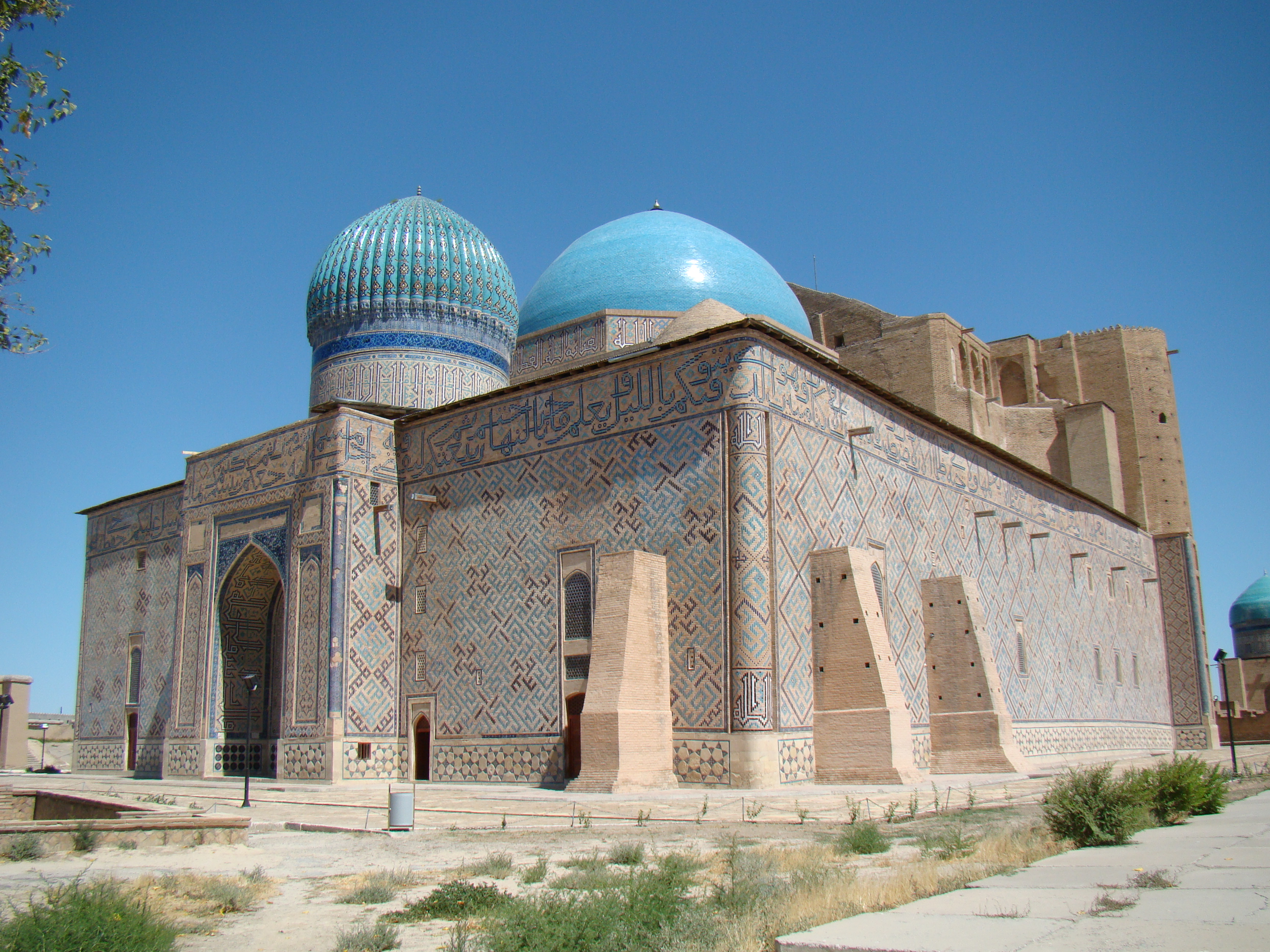 Ханака Ахмеда Ясави.